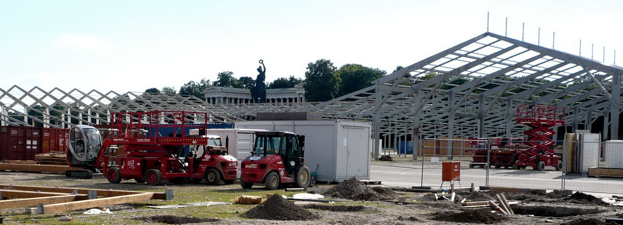 Aufbau der Festzelte in München für das Oktoberfest 2008 vor der Bavaria auf der Theresienwiese.